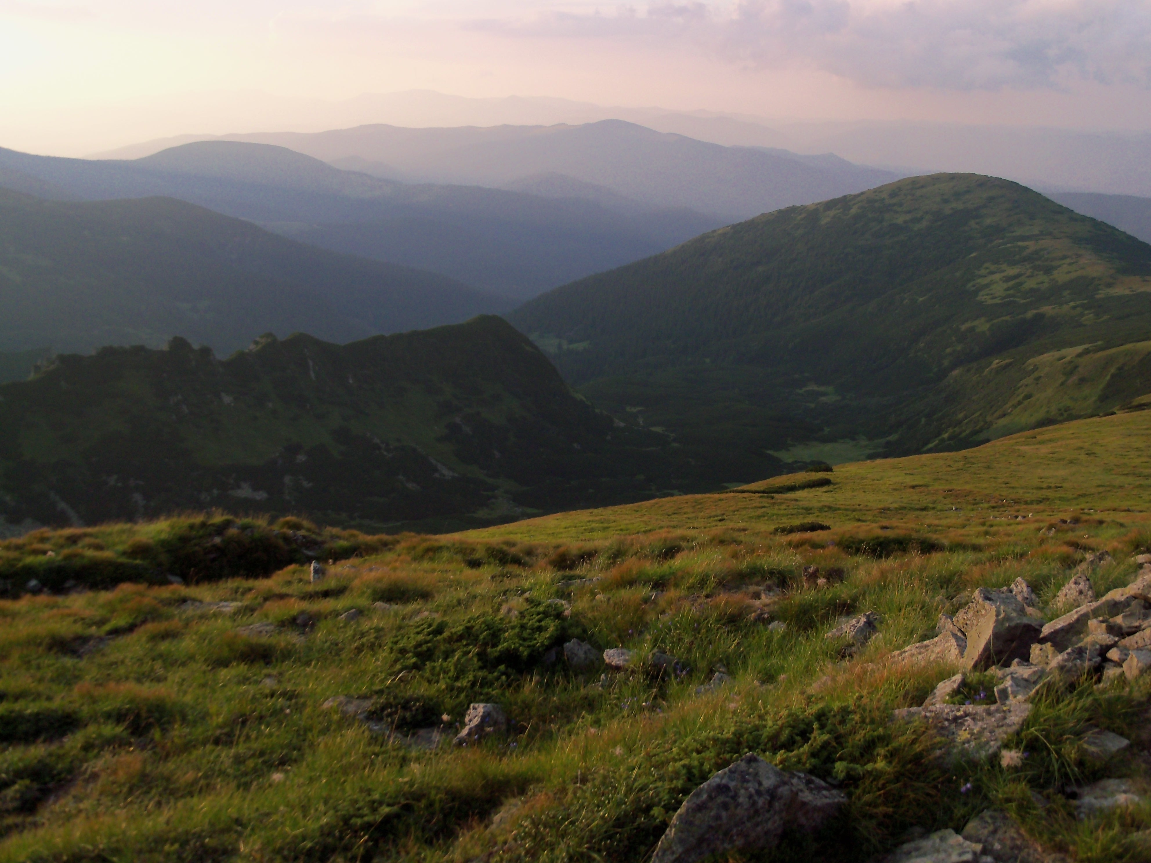 Відріг "Великий Козел" і гора Гомул, Чорногора, Українські Карпати